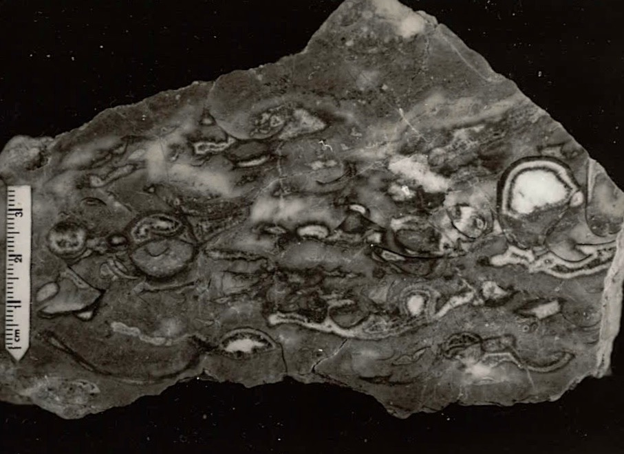 Devonischer Cephalopodenkalkstein (Rübeland), Anschliff